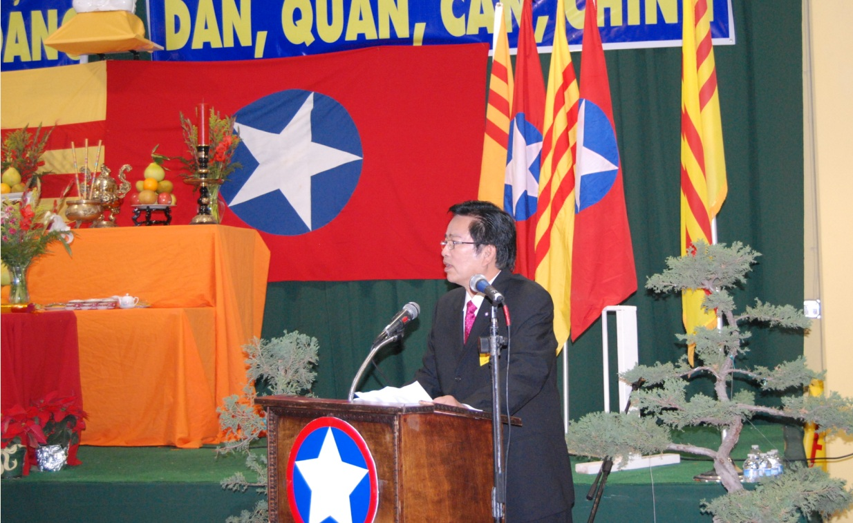 The flag of Nationalist Party of Greater Viet, used since 1939.